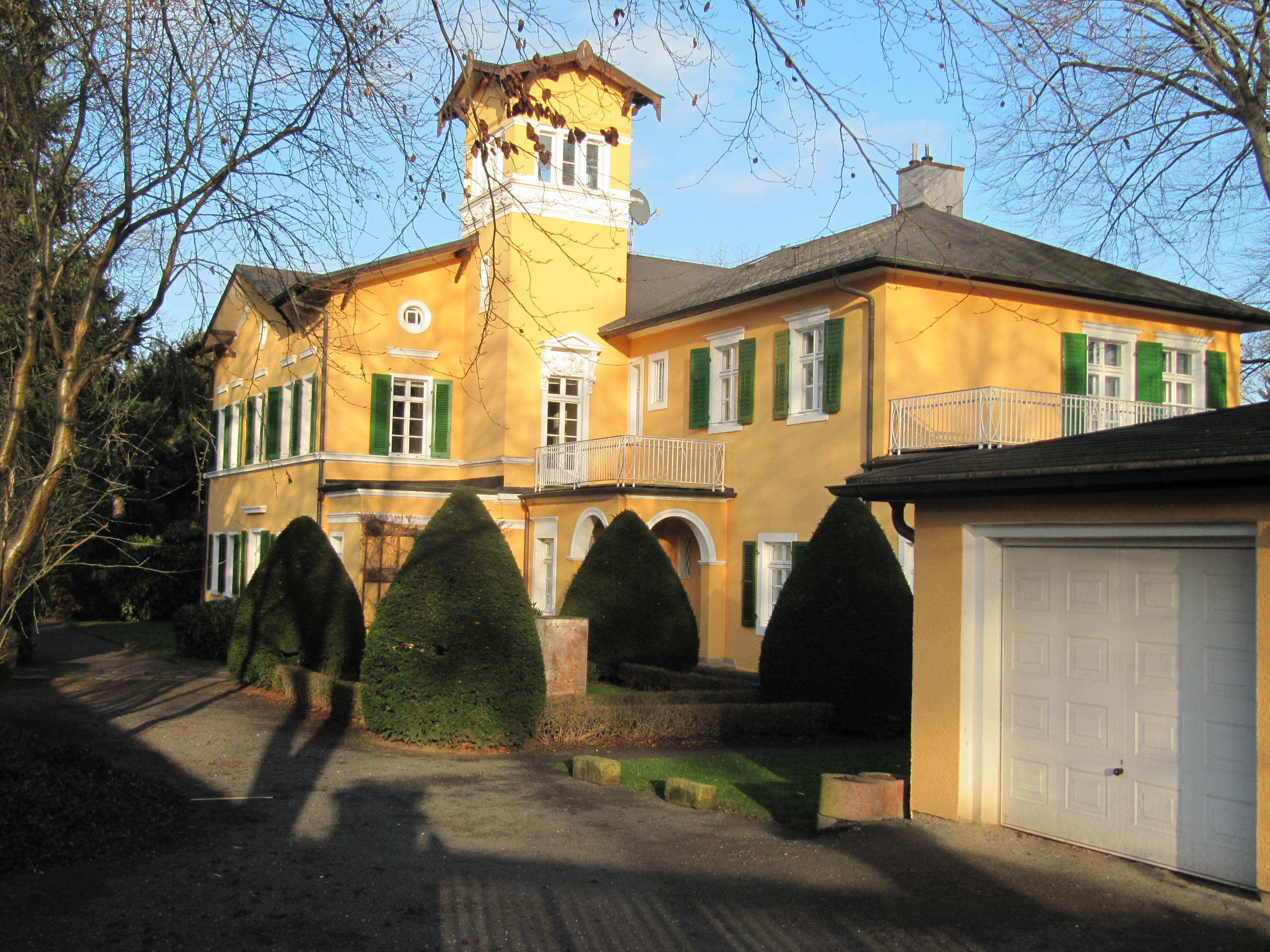 Unter Denkmalschutz stehende Villa in der Auenstraße 14 in Leipzig, Stadtteil Böhlitz-Ehrenberg („Schlobach-Haus“).